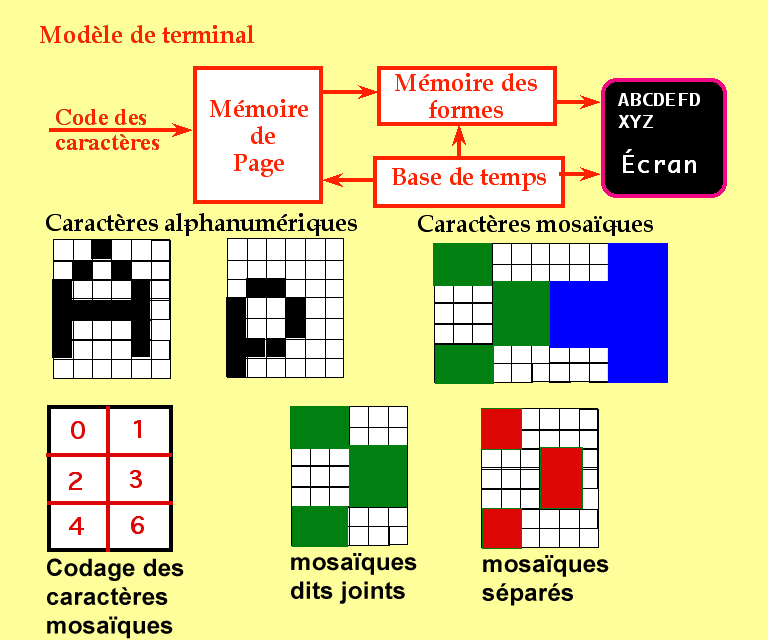 Extrait du cours sur l'histoire du Videotex : le mode alphamosaïque